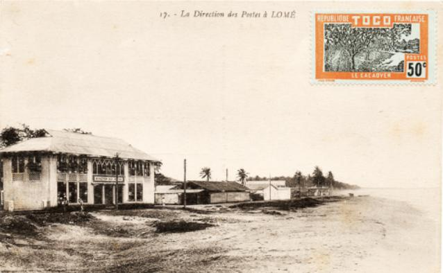 Nouveau bâtiment de la Direction des Postes de Lomé construit en 1930.